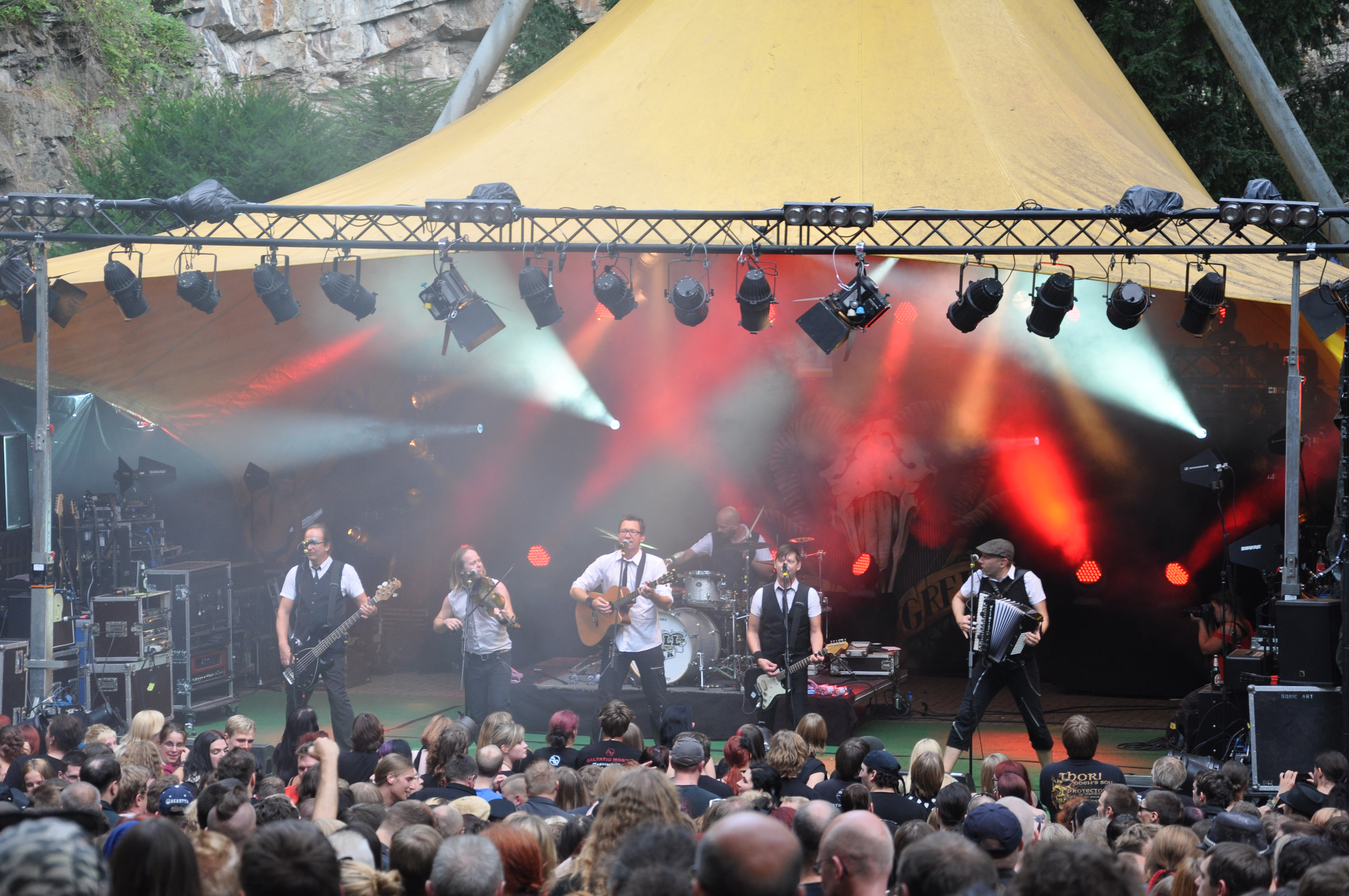 Feuertal 2013 in Wuppertal auf der Waldbühne Hardt: Fiddler’s Green